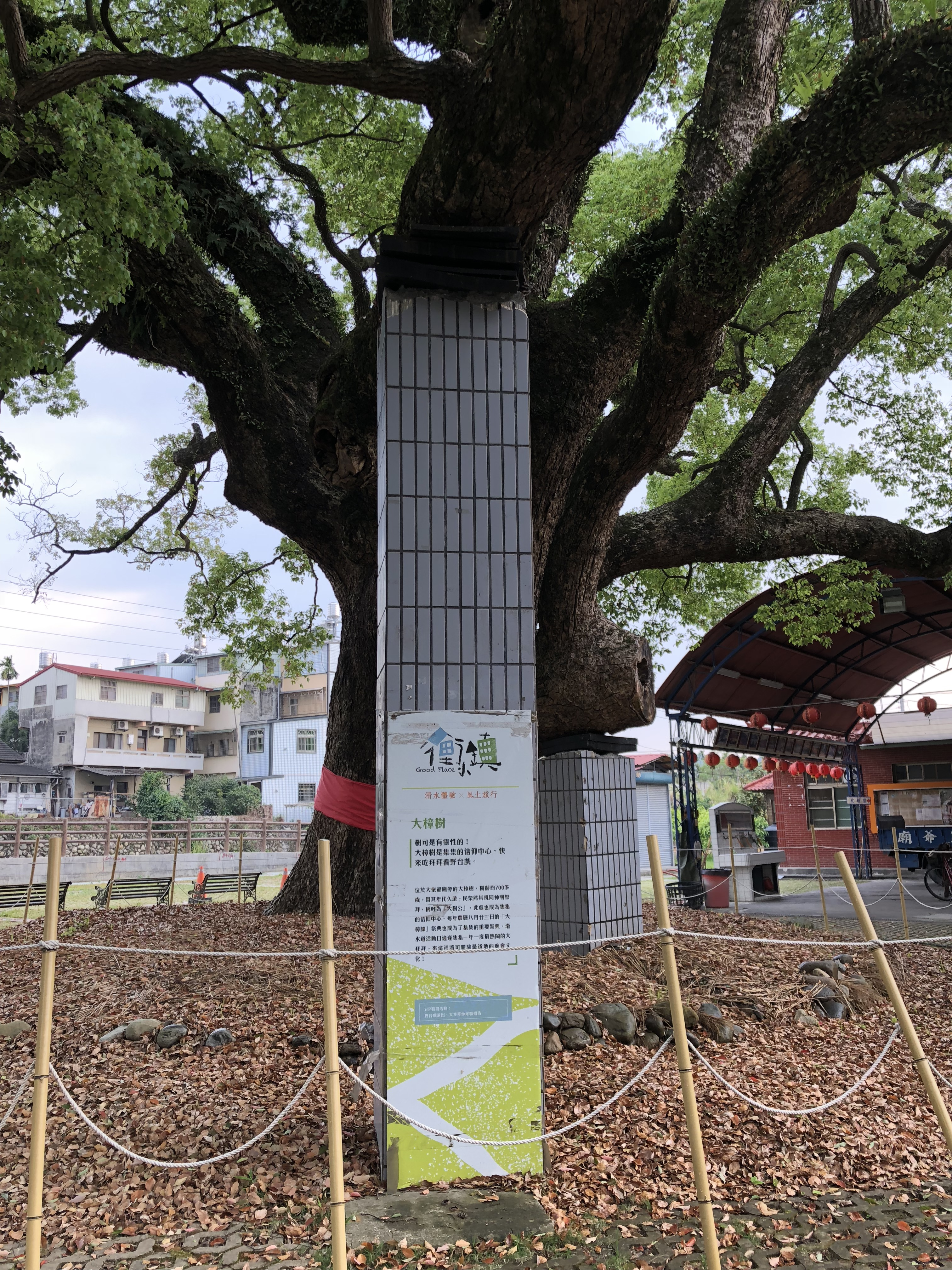 集集大樟樹的拐杖